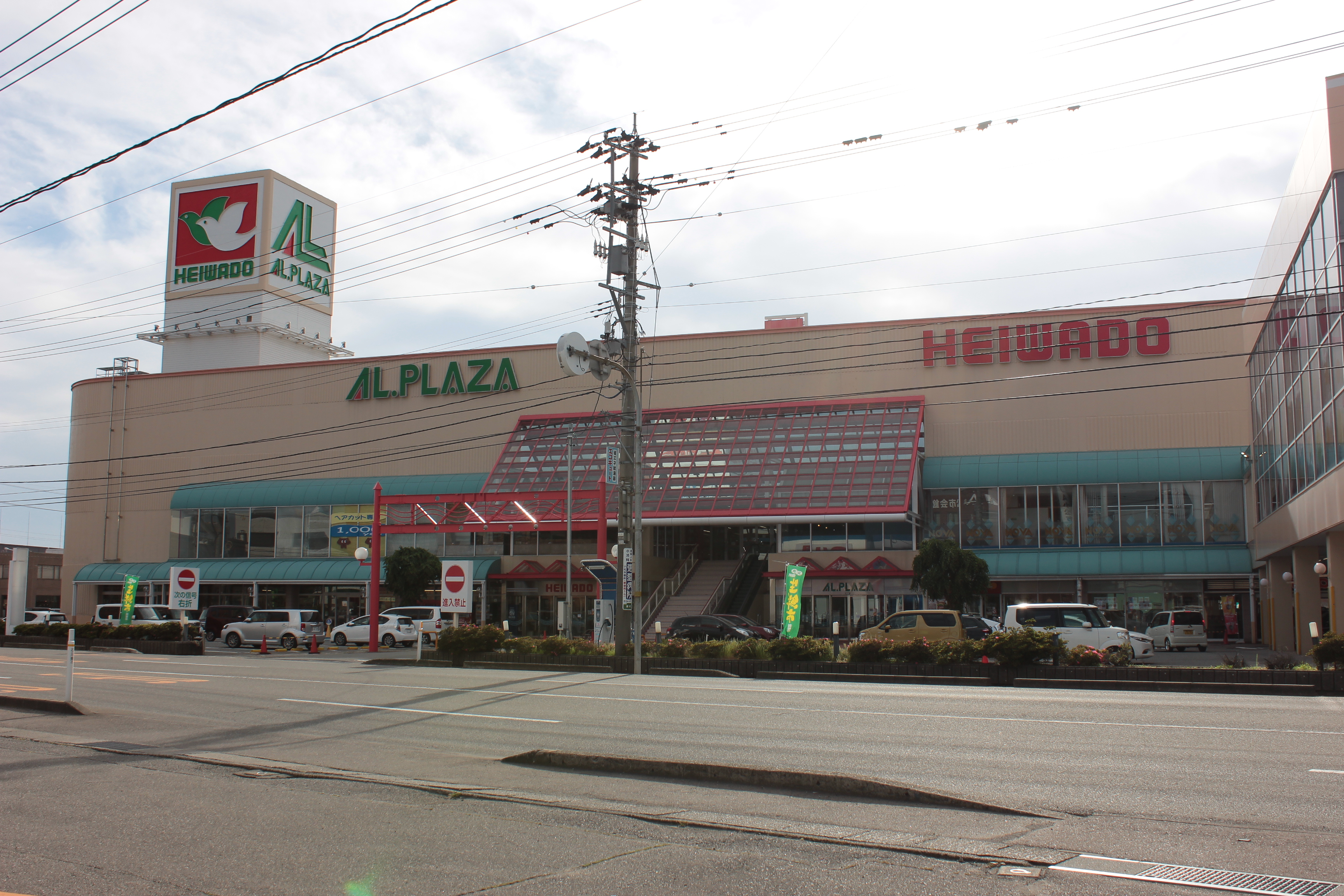 アル・プラザ小松（石川県小松市） Canon EOS Kiss X5